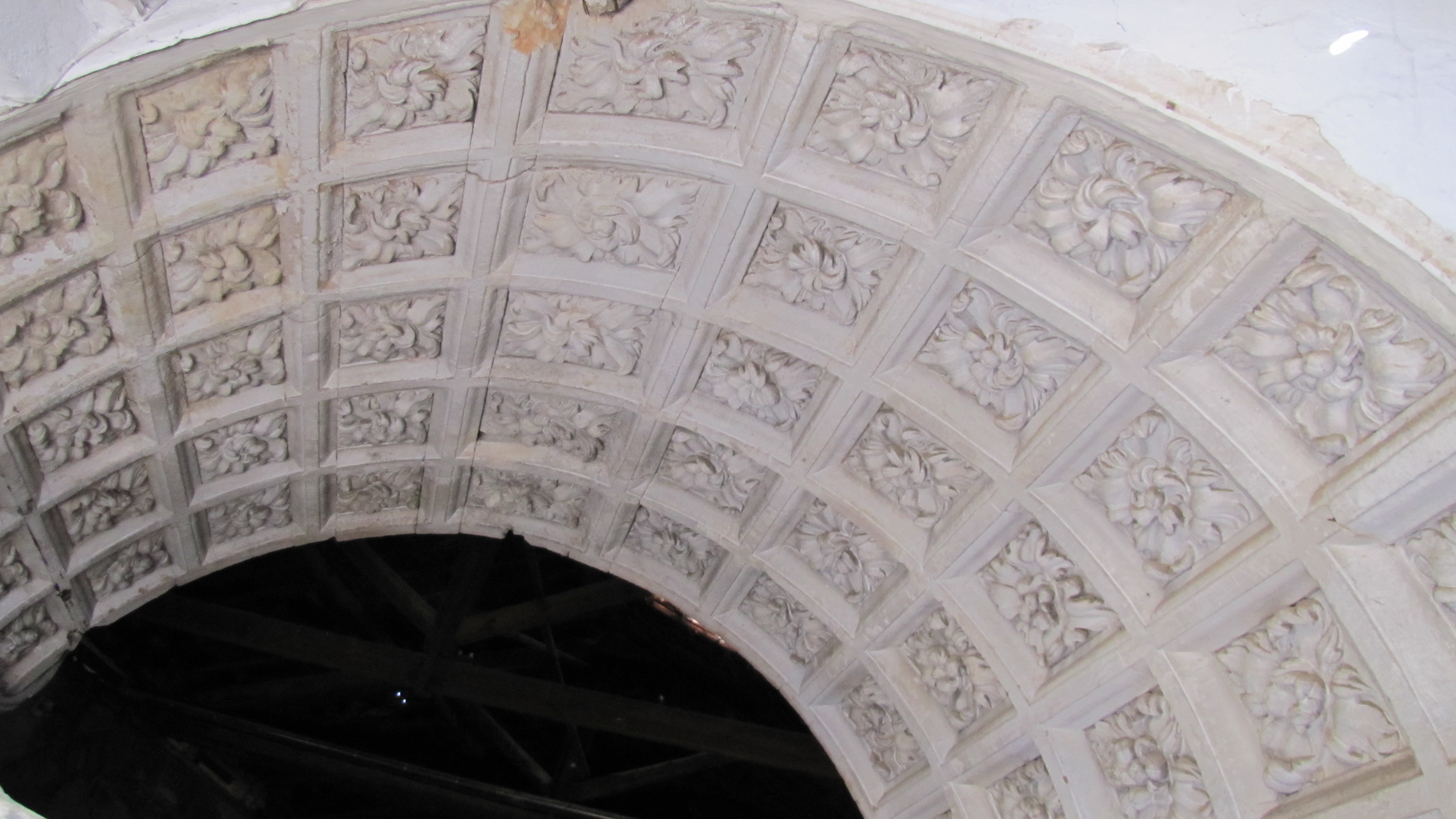 Detalle superior del arco conservado de una puerta del siglo XVI del Monasterio de Nuestra Señora de la Victoria, de la orden Jerónima en Salamanca (España). El arco es probablemente obra de Juan de Álava. El arco se encuentra conservado e integrado en las instalaciones fabriles del siglo XIX del Grupo Mirat en Salamanca.